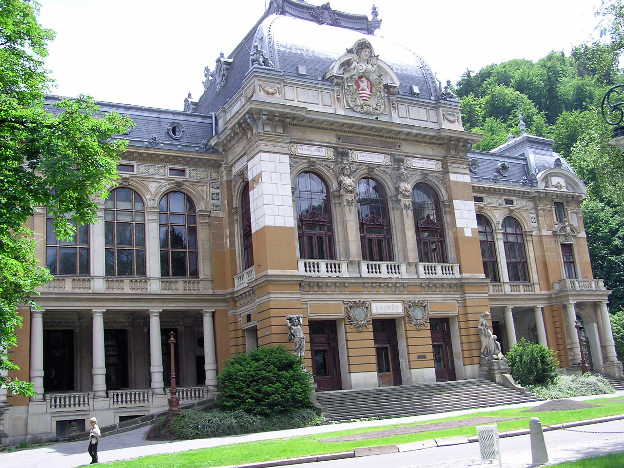 Karlovy Vary (Karlsbad) - Bad I (Kaiserbad)